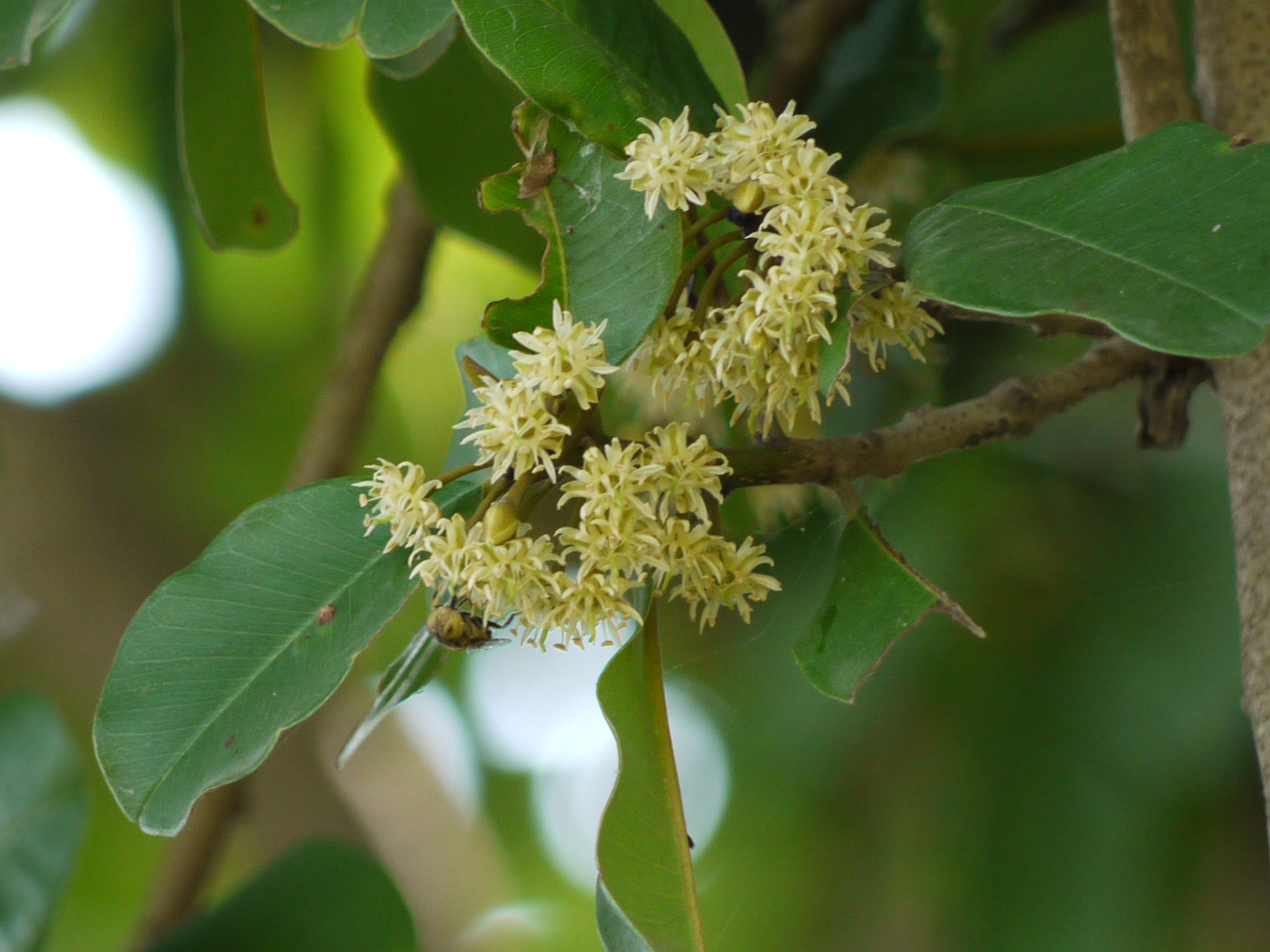 Sapotaceae (sapota family) » Manilkara hexandra man-il-KAR-uh -- Latinized form of the S. American vernacular name for Malabar heks-AN-druh -- meaning, having six stamens commonly known as: Ceylon iron wood, milk tree, wedge-leaved ape flower • Bengali: krikhiyur • Gujarati: ખિર્ની khirni, રાયન rayan • Hindi: दृढ़ drirh, खिरनी khirni, क्षीरी kshiri, रायन rayan • Kannada: bakula • Konkani: कर्णी karni, रांजण ranjana • Malayalam: കൃണി krini, പഴമുന്പാല pazhamunpaala • Marathi: करणी karani, खिरणी khirni, राजण rajana, रांजण ranjana, रायण rayan, रायणी rayani • Sanskrit: क्षीरिणी kshirini, निम्बबिज nimbabija, राजादन rajadana • Tamil: உலக்கைப்பாலை ulakkai-p-palai • Telugu: అంకాలు ankalu, నందివృక్షము nandivriqshamu, పాలచెట్టు palachettu Native to: India, China, Bangladesh, Sri Lanka References: The Book of INDIAN TREES by K. C. Sahni • eFlora • NPGS / GRIN